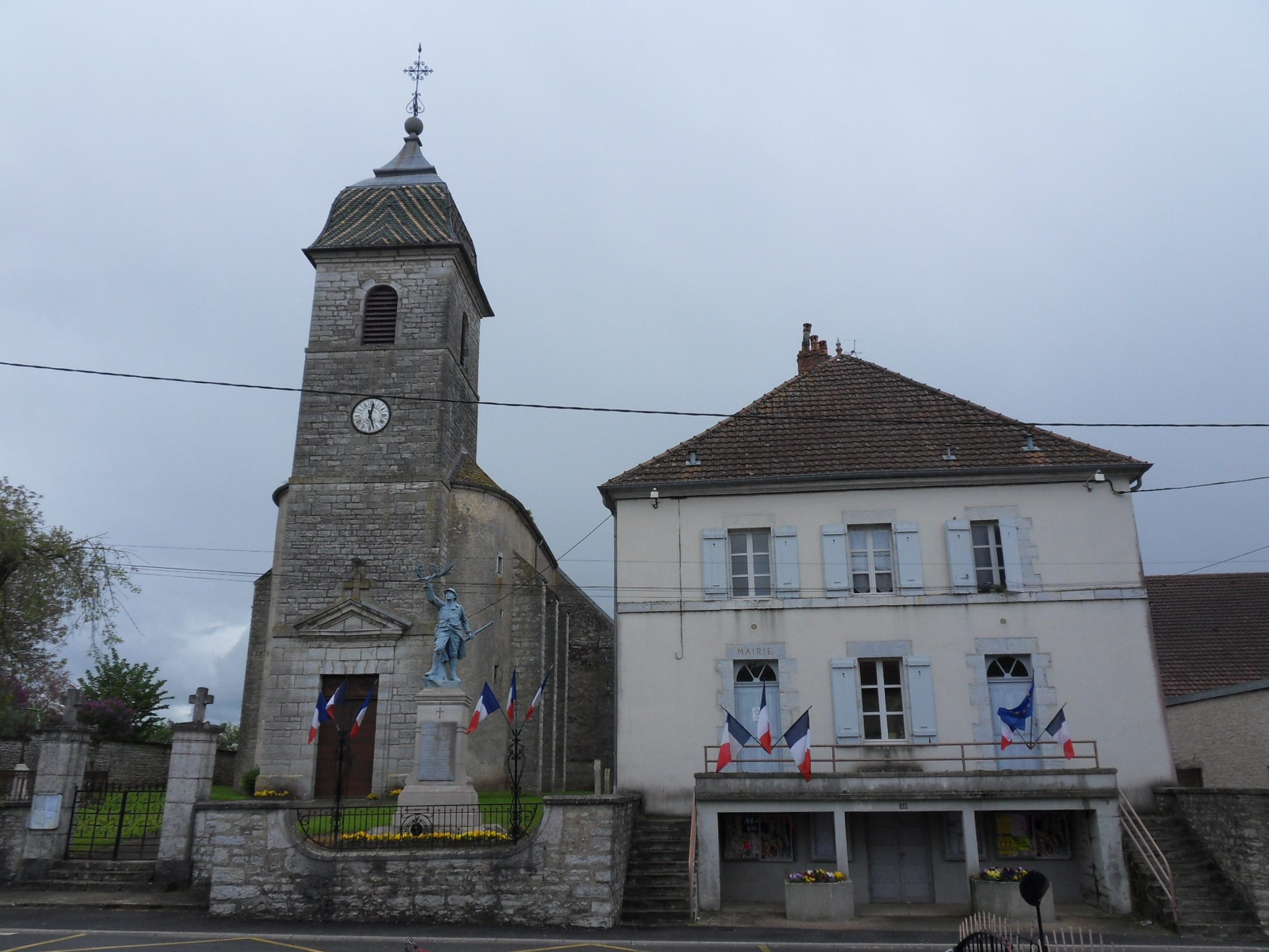 L'église et la mairie de Brussey, Franche-Comté France.